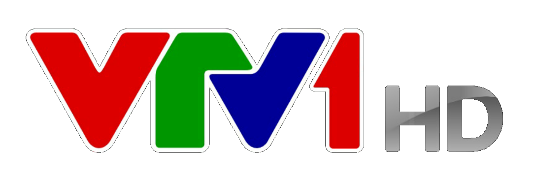 Logo chính thức của VTV1 dưới định dạng HD, được lấy từ trang web